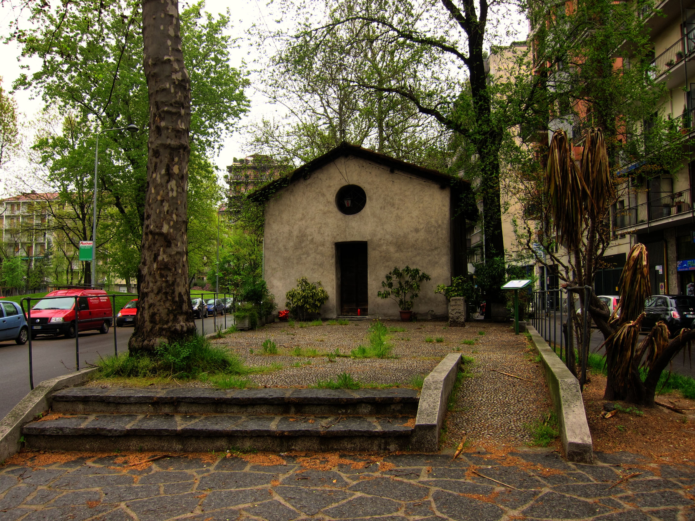 Oratorio di San Protaso vescovo, via Lorenteggio, Milano